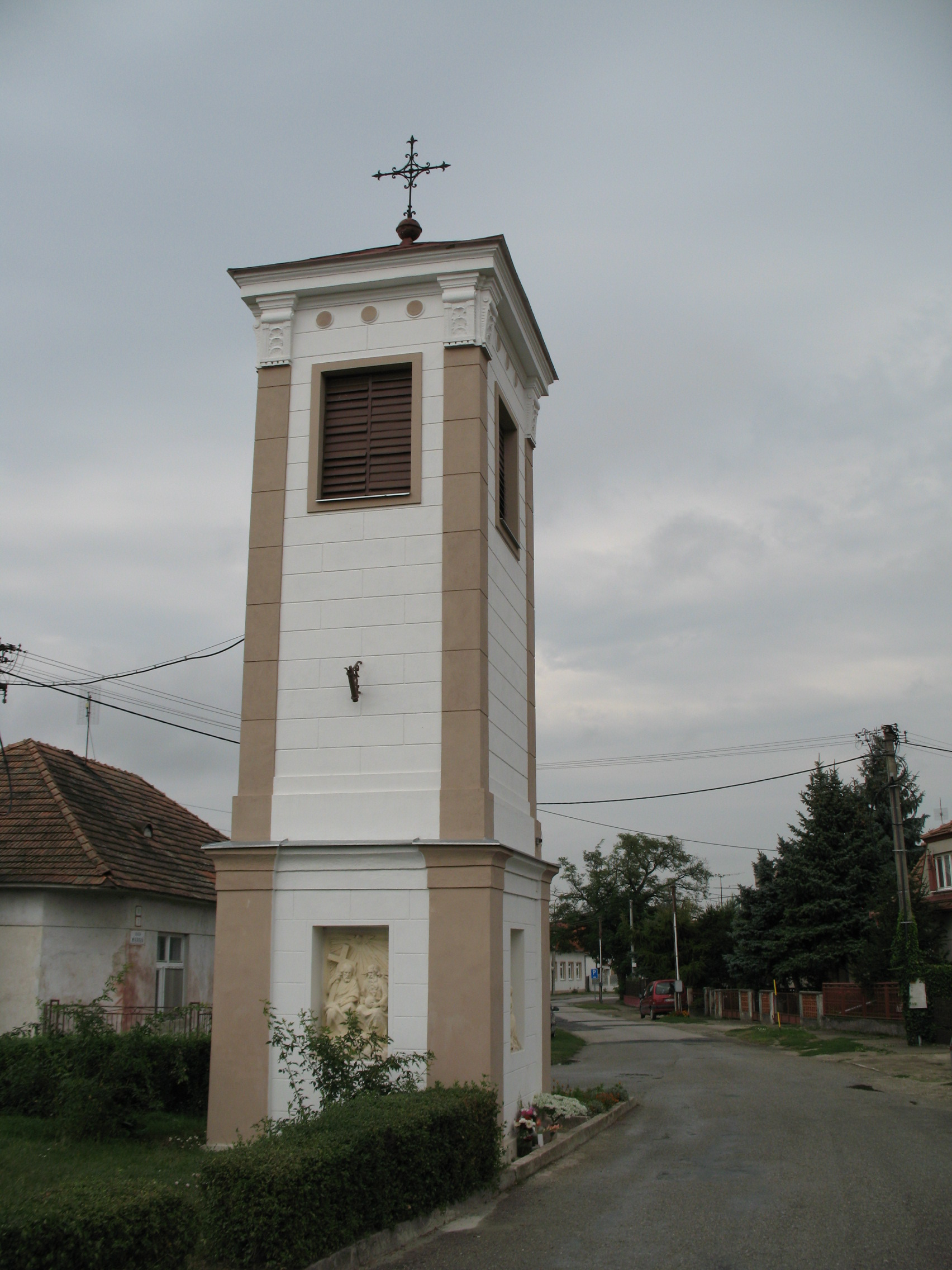 Dunasápújfalu